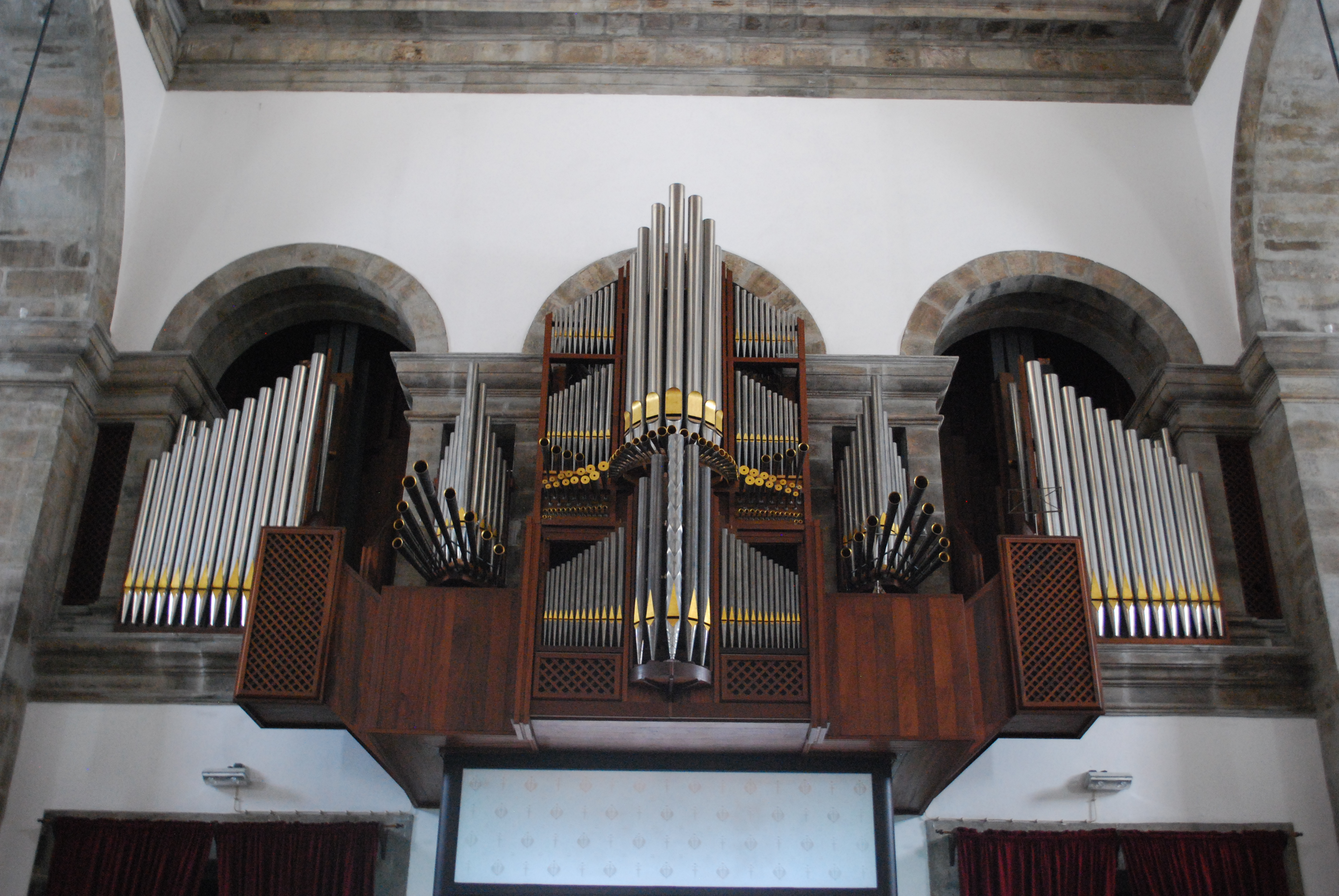 Orgão da Igreja do Santíssimo Salvador da Sé em Angra do Heroísmo.